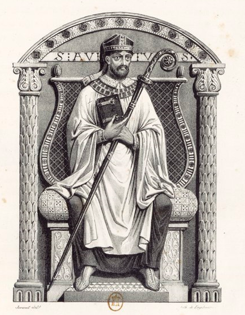 Avit II de Clermont, illustration issue de Voyages pittoresques et romantiques dans l'ancienne France : Auvergne, tome I de Taylor et Nodier. " C'est Saint Avit II que nous représentons dans cette vignette; il vécut vers l'année 675. " Taylor et Nodier.